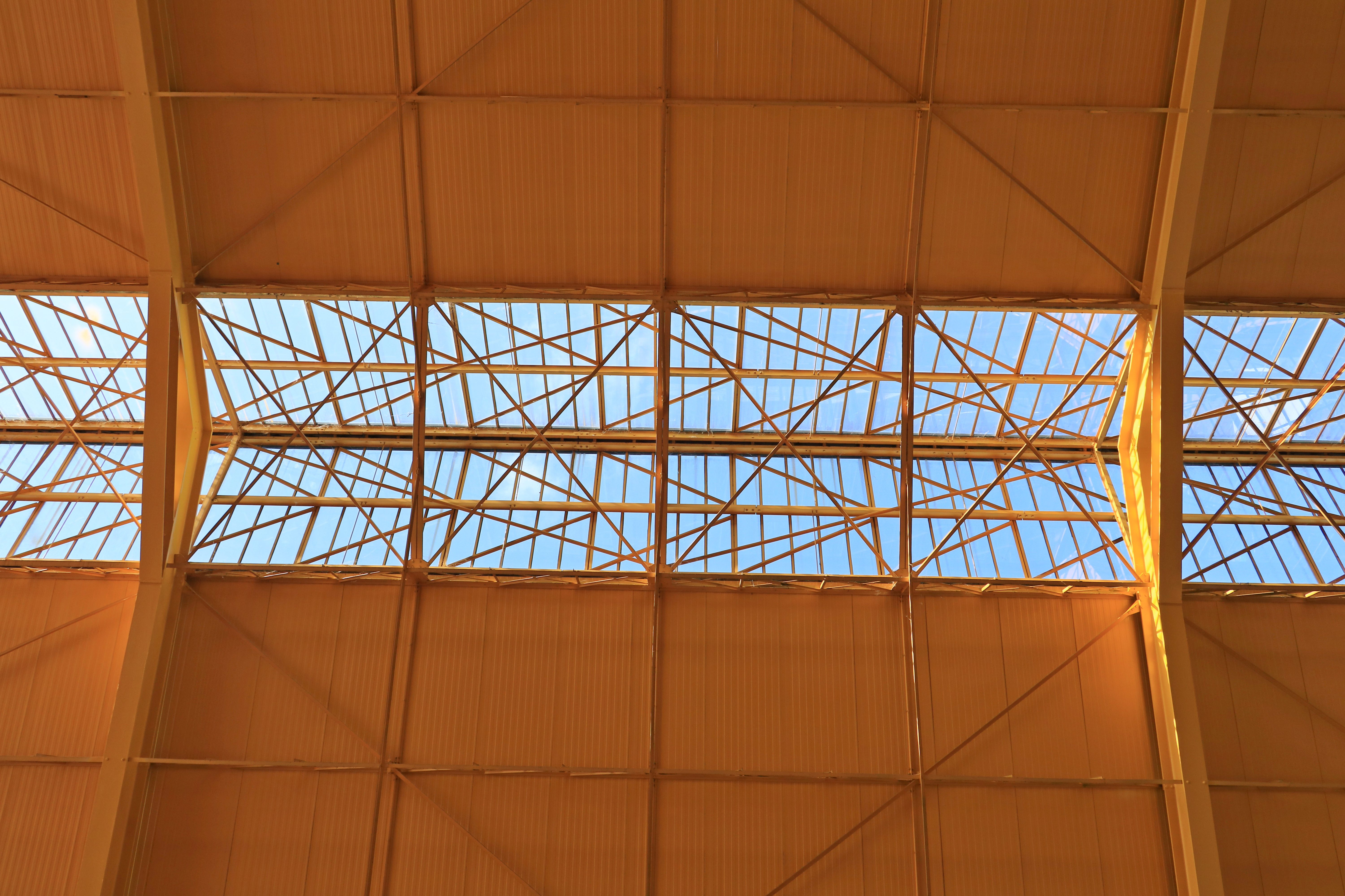 Belgique - Brabant wallon - Court-Saint-Étienne - Anciennes usines Henricot - Parc à Mitrailles